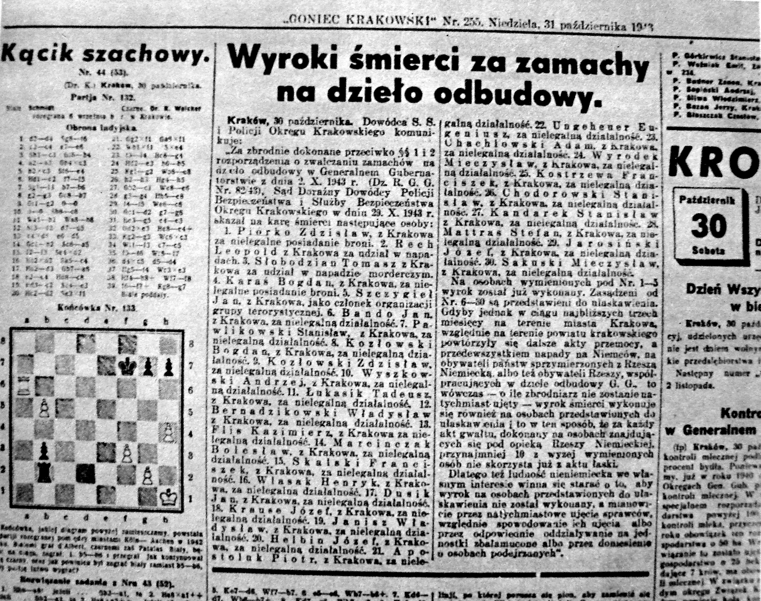 Obwieszczenie o wykonaniu wyroków śmierci za "zamachy na dzieło odbudowy" z "Gońca Krakowskiego" 1943 rok.